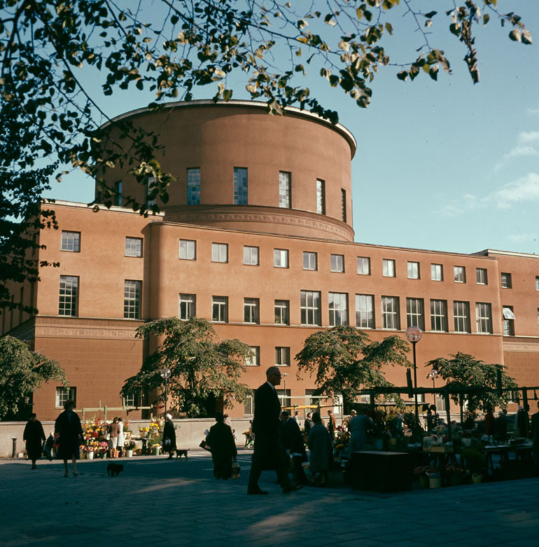 Spelbomskans Torg och Stadsbibliotekets västra fasad